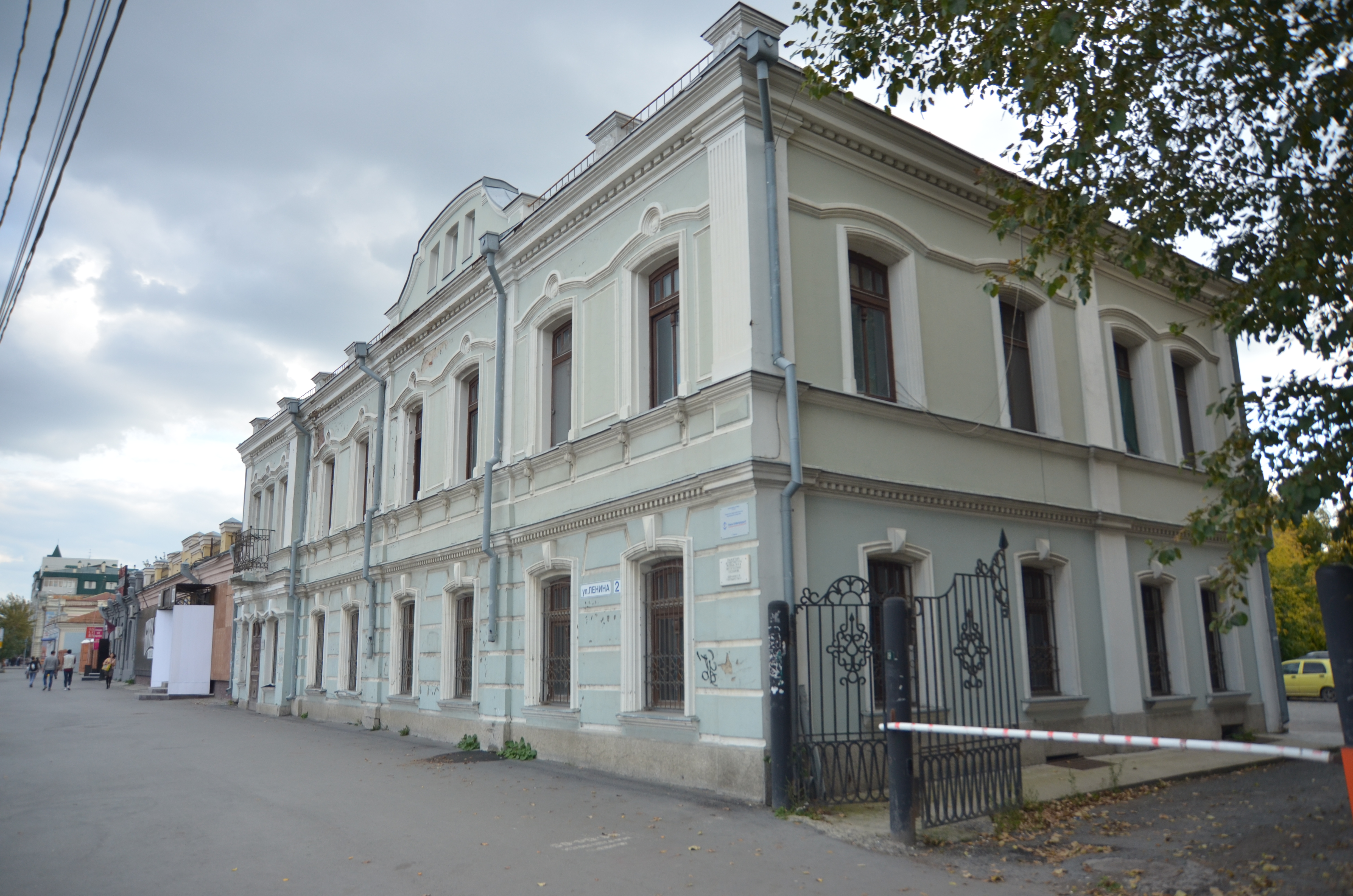 Дом В.А. Копылова: улица Ленина, 4а (на адресной табличке — ул. Ленина, 2), Тюмень, Тюменская область